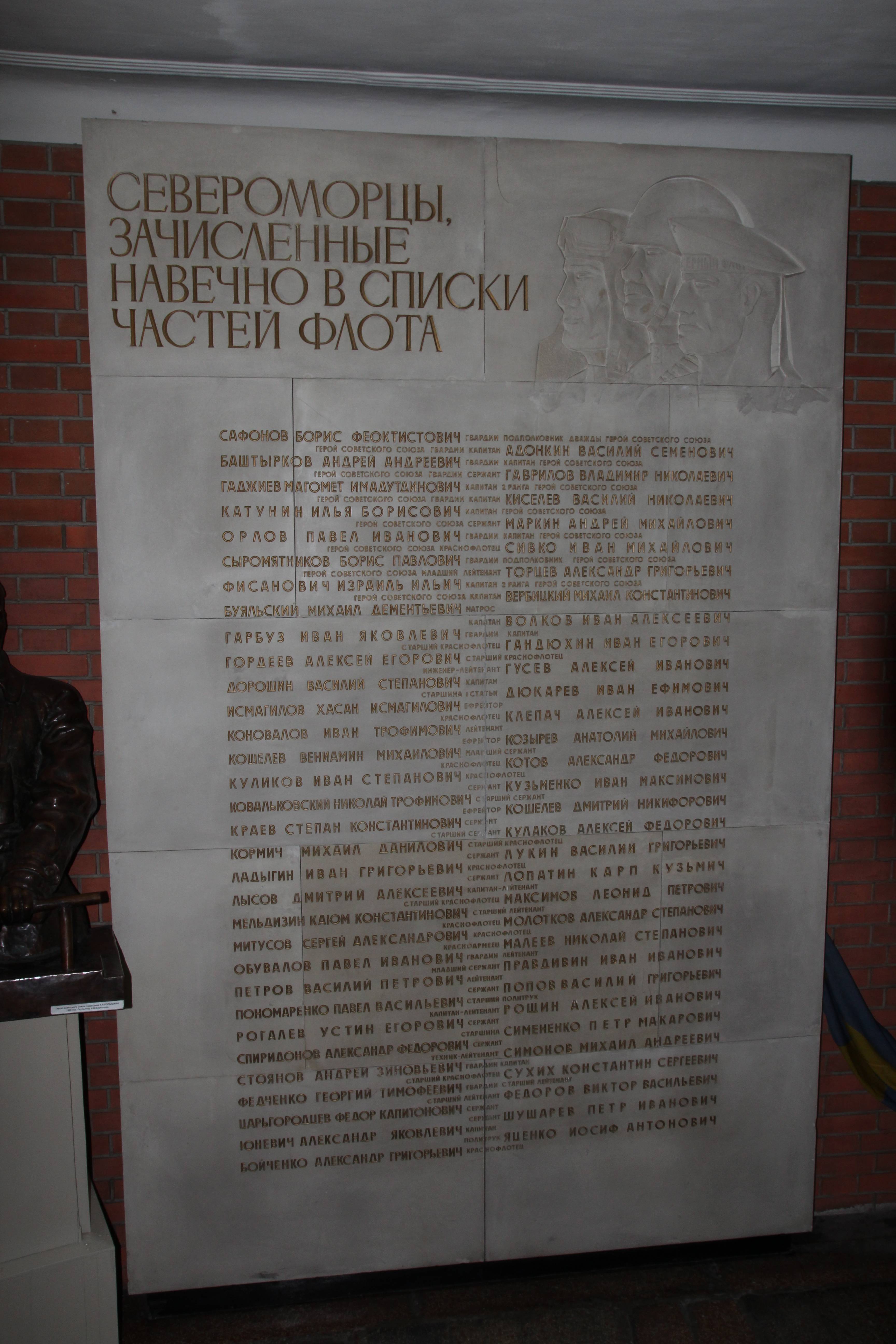 Североморцы, зачисленные навечно в списки частей флота